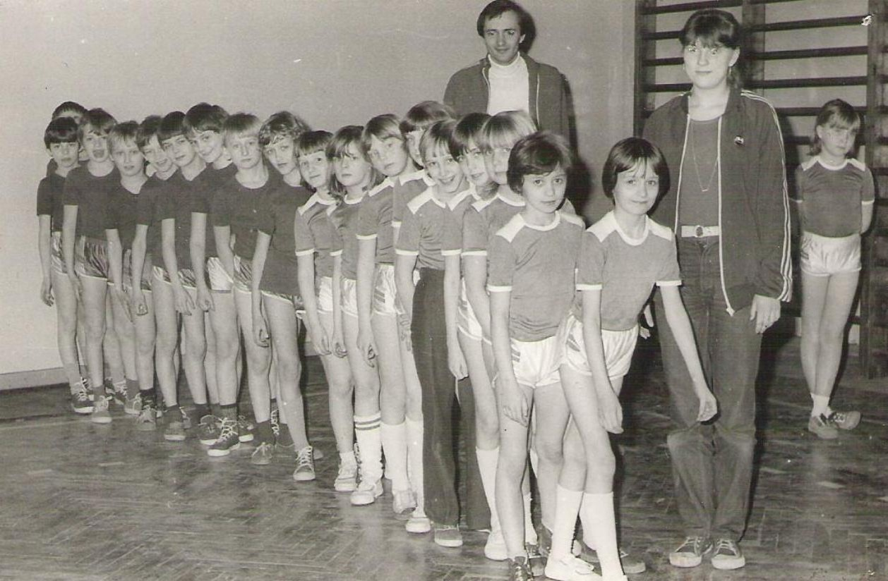 SP 1 - Tadeusz Gutowski